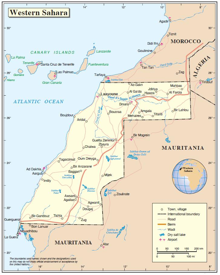 Χάρτης της Δυτικής Σαχάρας από το χαρτογραφικό τμήμα του ΟΗΕ, Οκτώβριος 2012